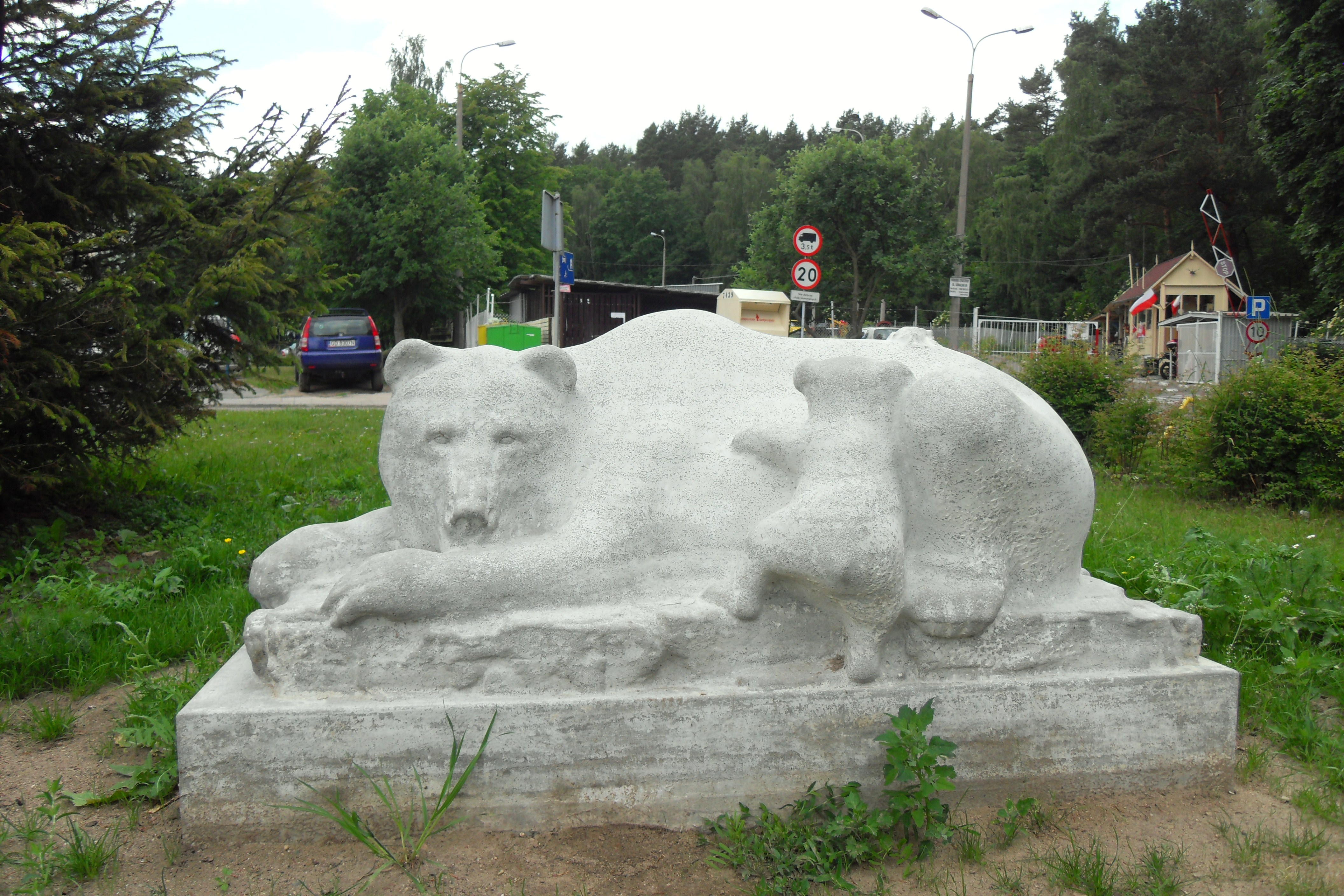 Gdańsk Niedźwiednik, ul. Góralska. Rzeźba, niedźwiedzie.